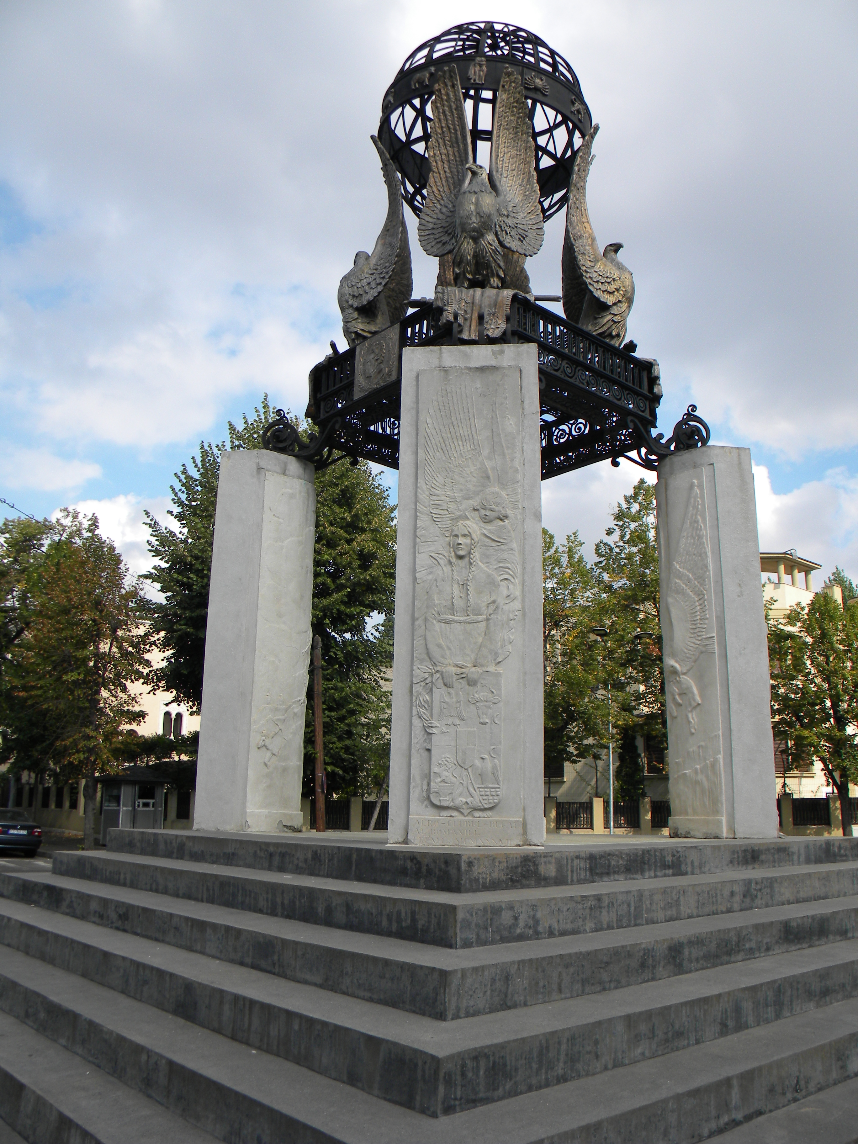 Bucuresti, Romania, Piata Quito, Monumentul in memoriam lui Mircea Zorilescu; B-III-m-B-20026 (12)